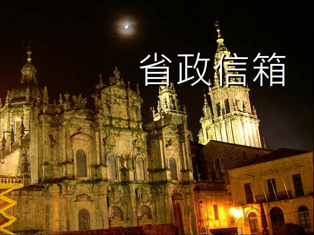 模擬臺灣電視公司公共服務節目《省政信箱》之節目名稱圖卡。